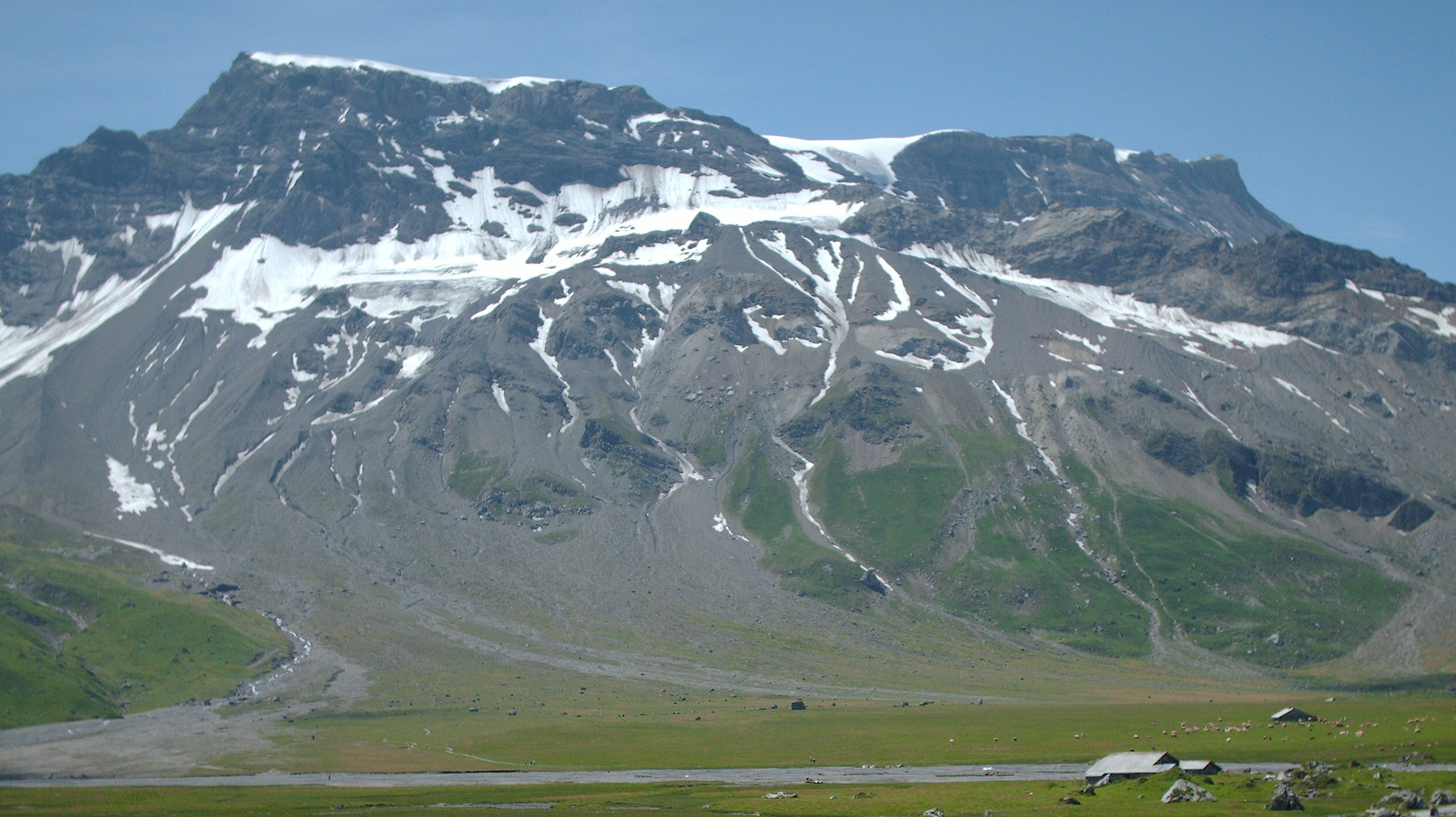 Wildstrubel with Engstligenalp in foreground Adelboden, Bernese Alps / Berner Oberland Selbst photographiert am 11. Juli 06